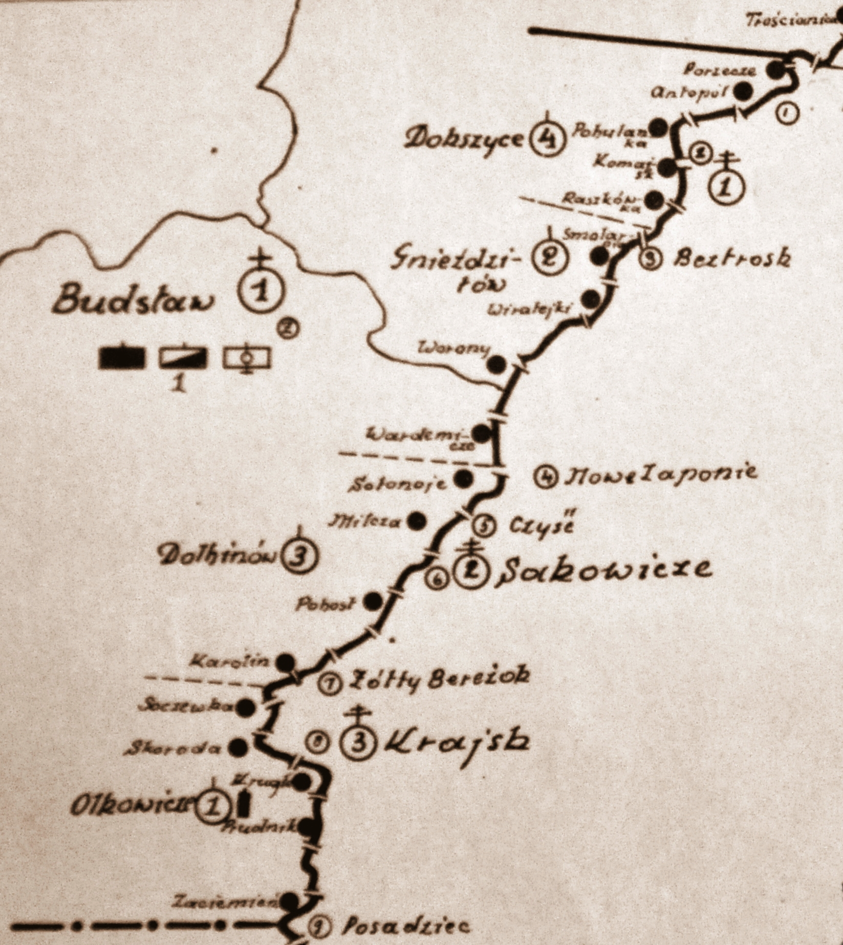 Szkic rozmieszczenia batalionu KOP Budsław w 1931